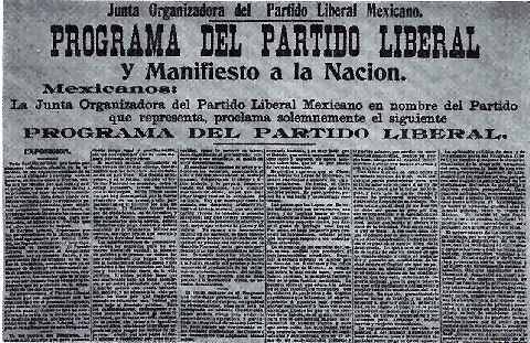 Programa del Partido Liberal Mexicano publicado en el periódico Regeneración, editado por los hermanos Flores Magón, 1 de julio de 1906.